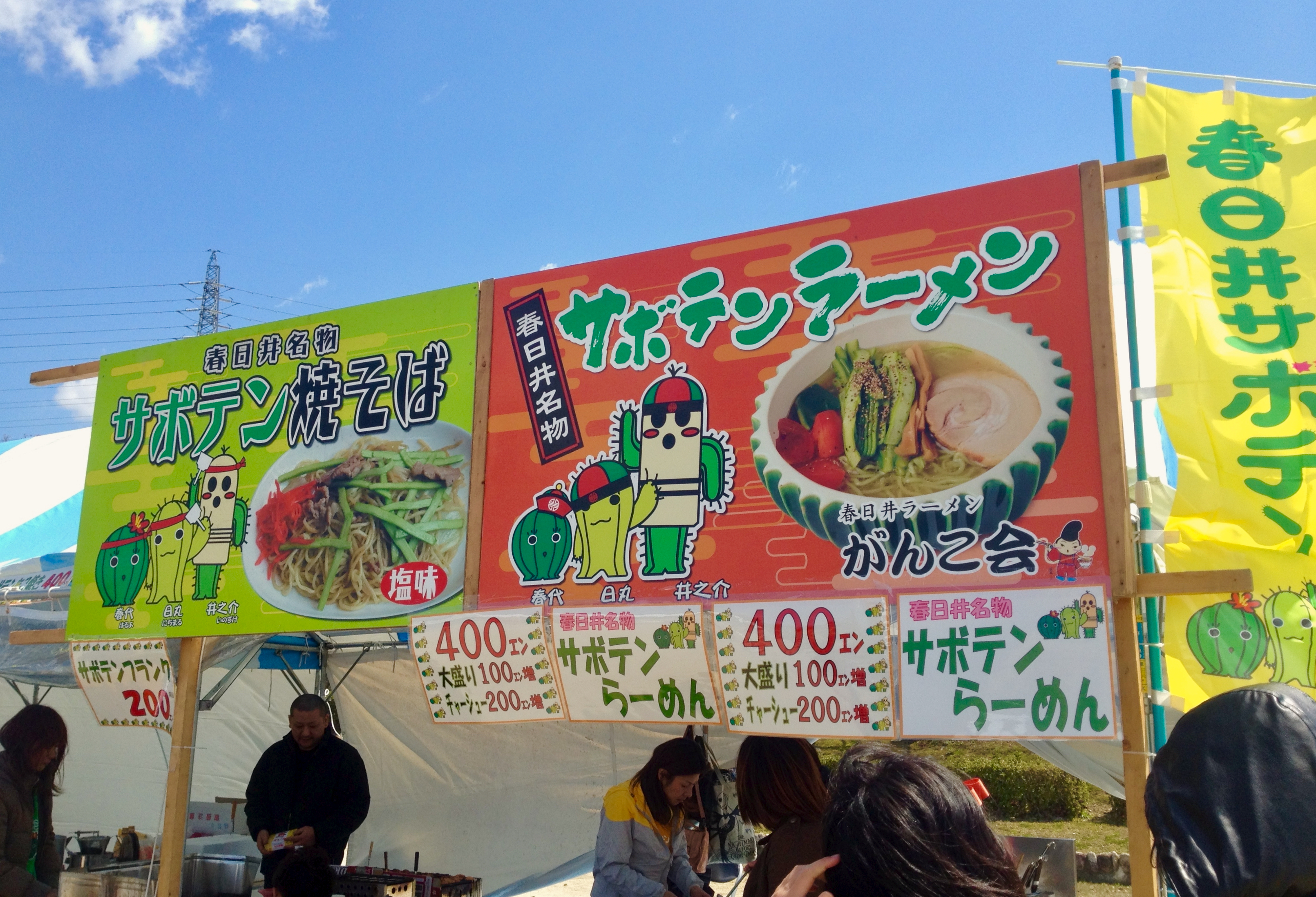 落合公園で毎年行われている「春日井サボテンフェア」の写真。このイベントではサボテンを使った色んな料理が販売されています。